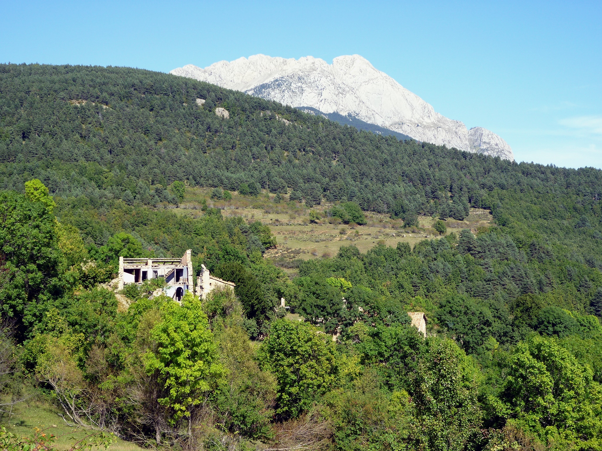 Nucli de Maripol, sota el Serrat de la Matella, amb el Pedraforca al fons